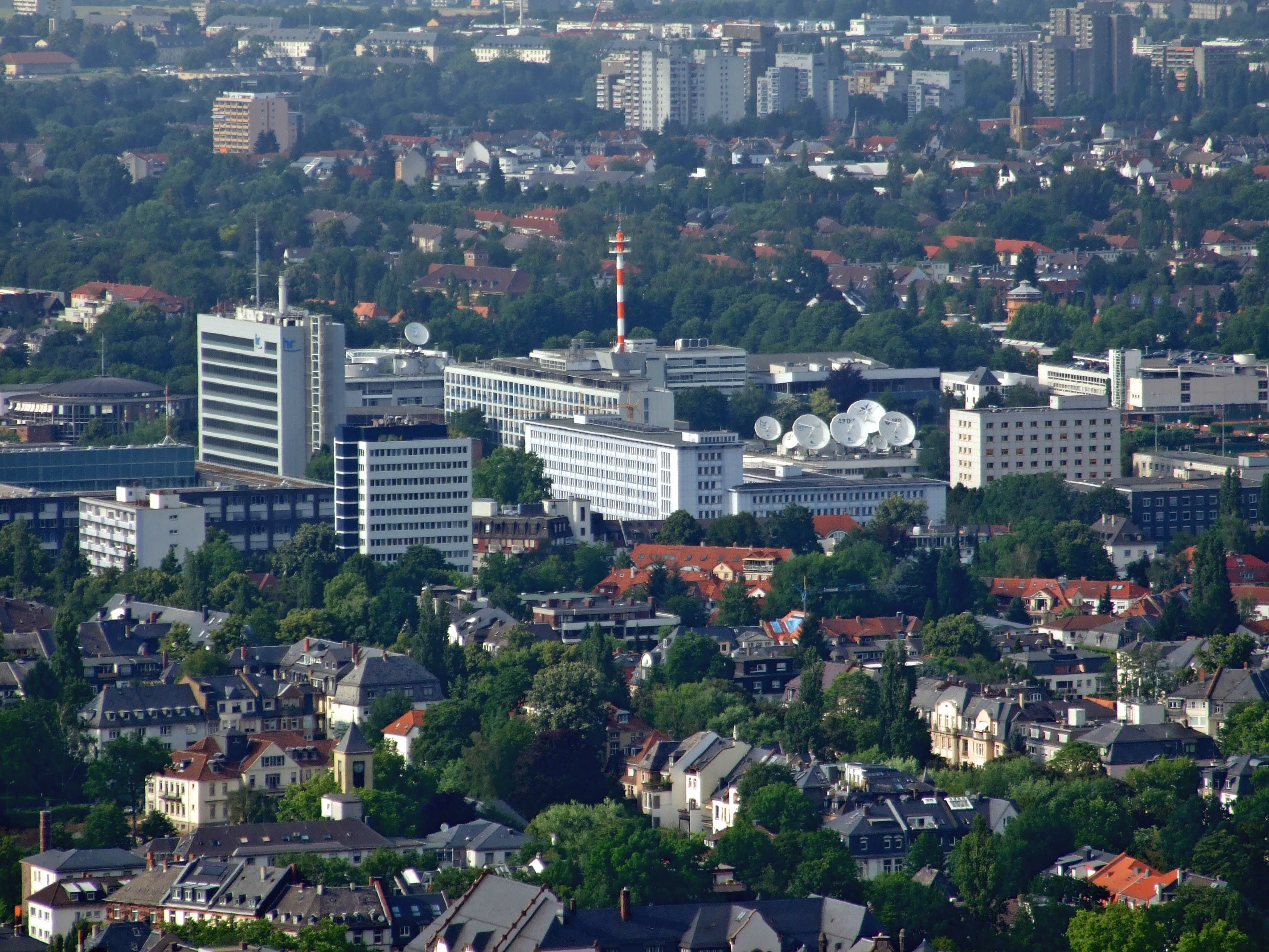 Hessischer Rundfunk, neben dem Polizeipräsidium (links), vom MAIN TOWER aus gesehen.